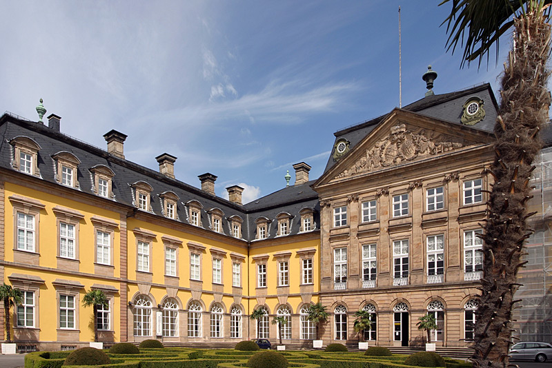 Residenzschloss Bad Arolsen